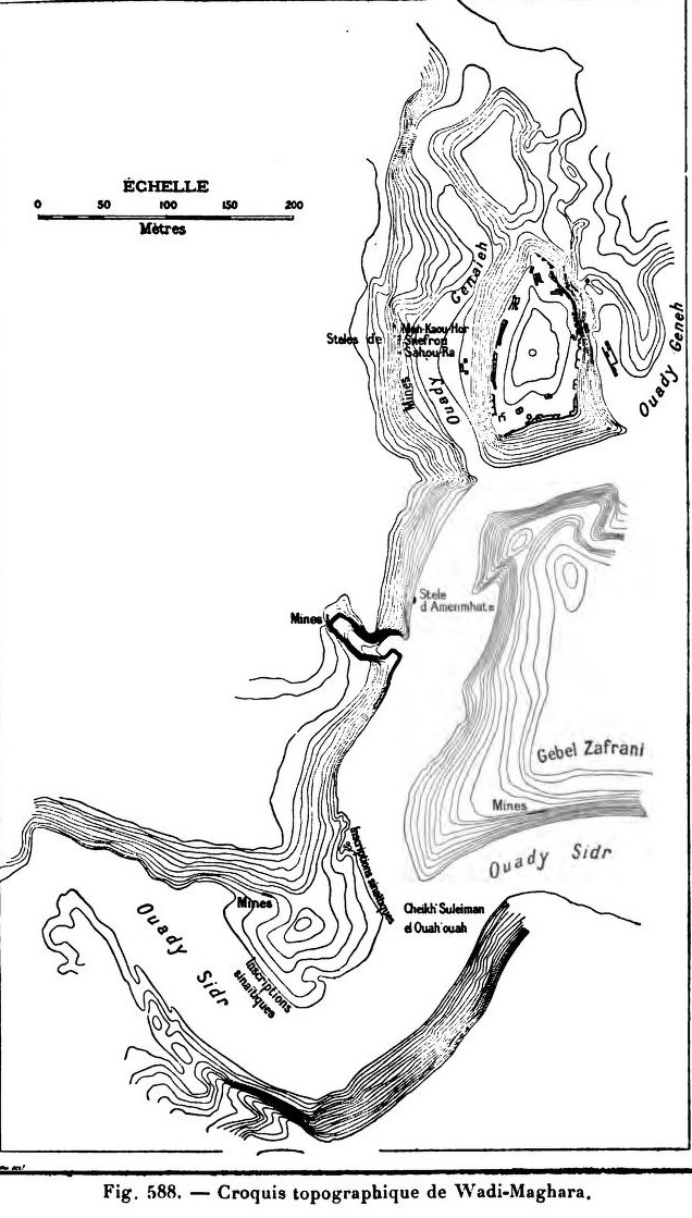 Topografie des Wadi-Maghara auf der Sinai-Halbinsel mit Minen, Stelen, Inschriften